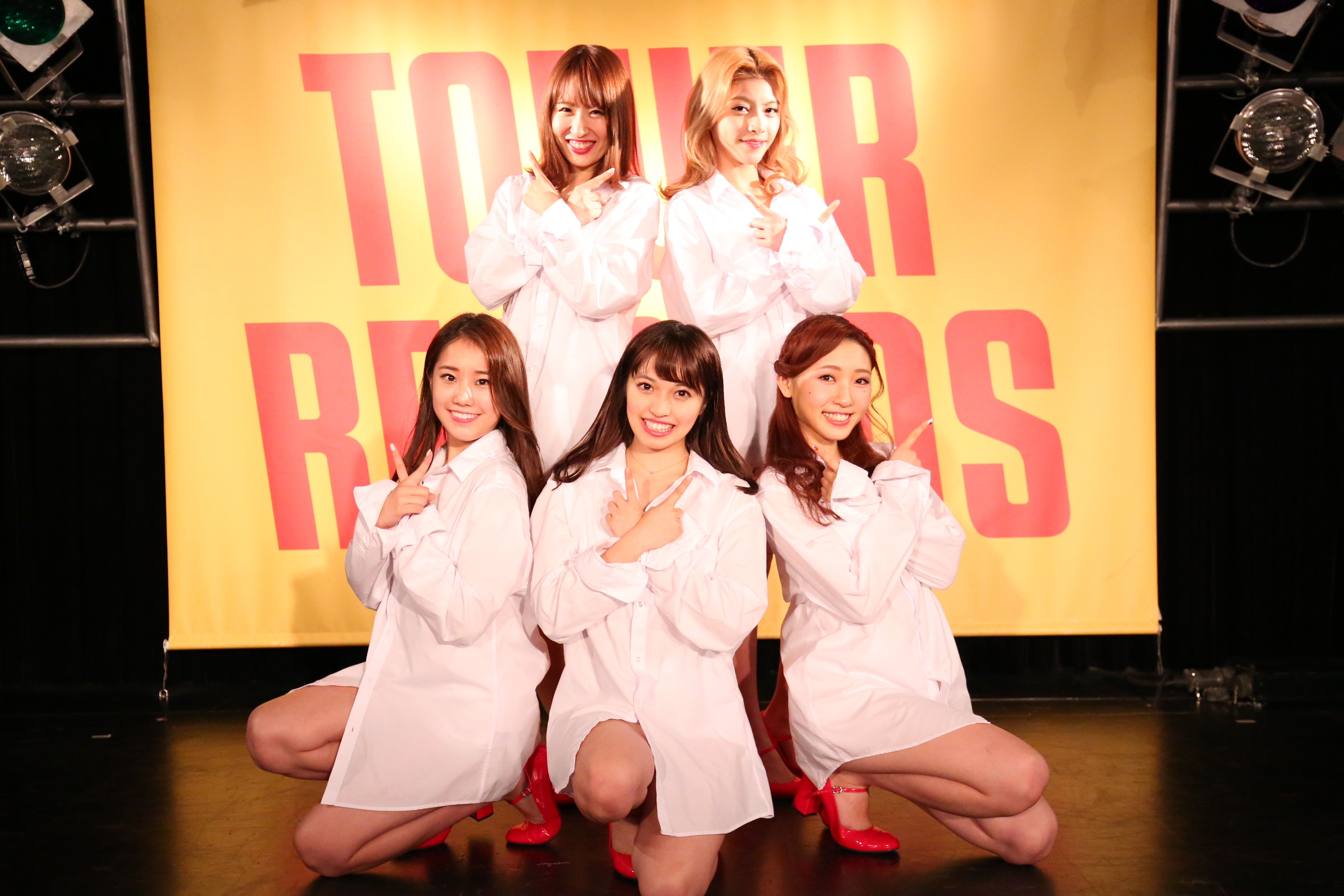 2016年10月16日（日）2ndシングル『白いシャツ』リリース記念イベント